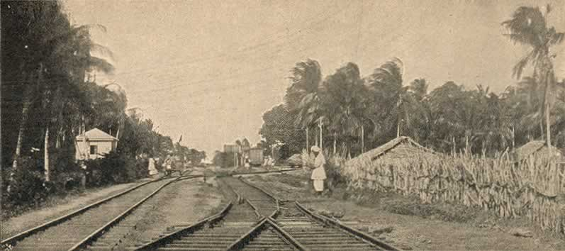 Ugandabahn: Bahnhof Changamwe bei Mombasa